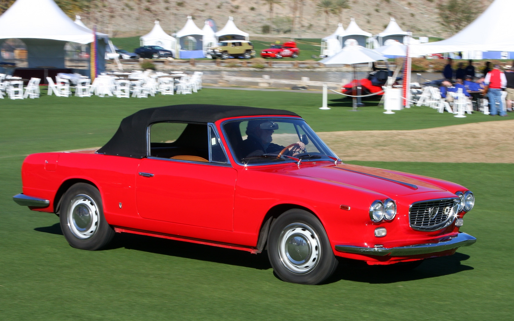 2011 Desert Classic, La Quinta, CA